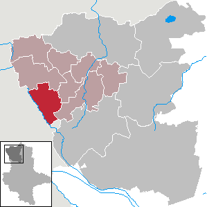 Lage von Jübar im Altmarkkreis Salzwedel